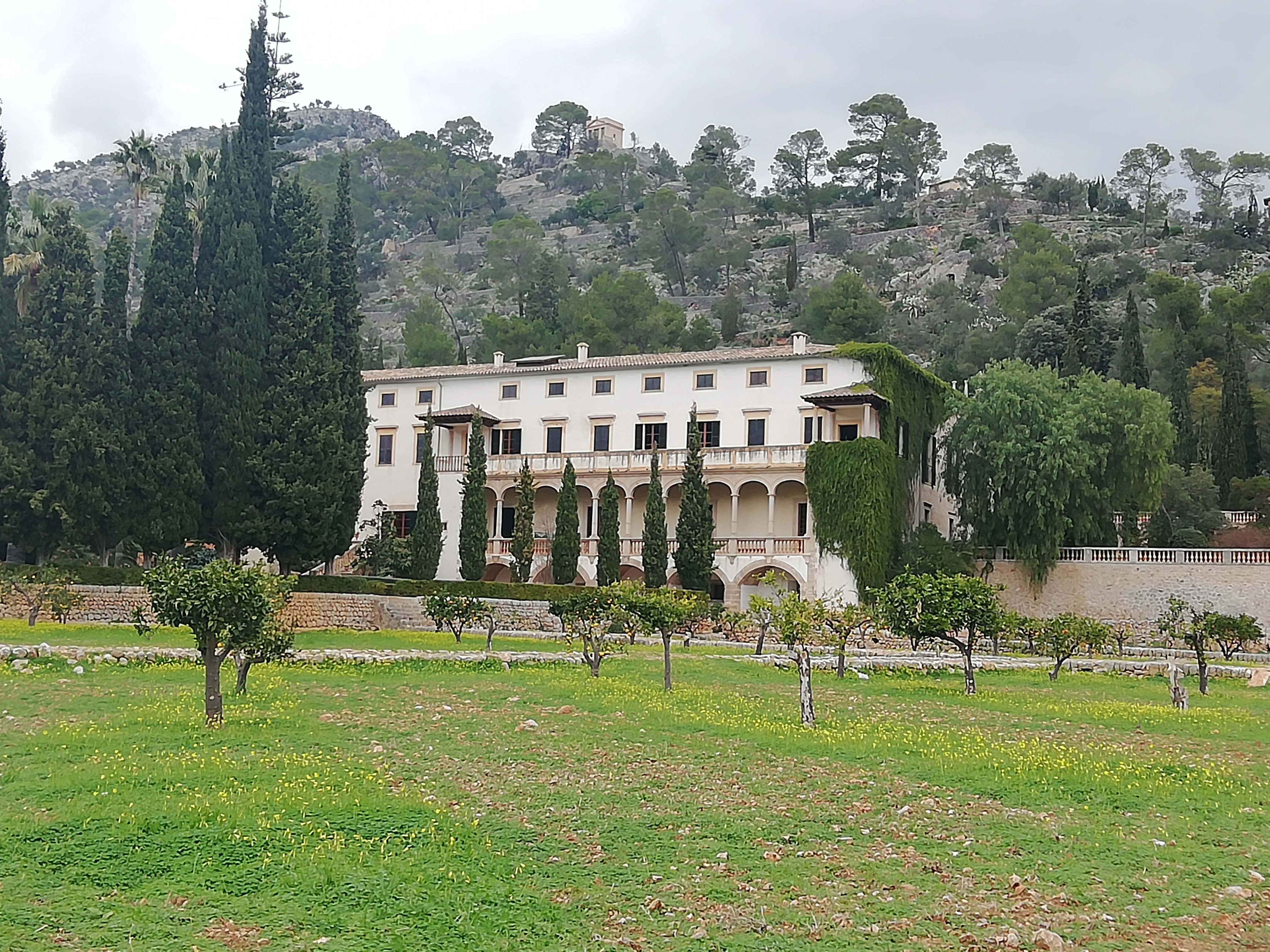 Fachada principal de la finca mallorquina Raixa, en Buñola.